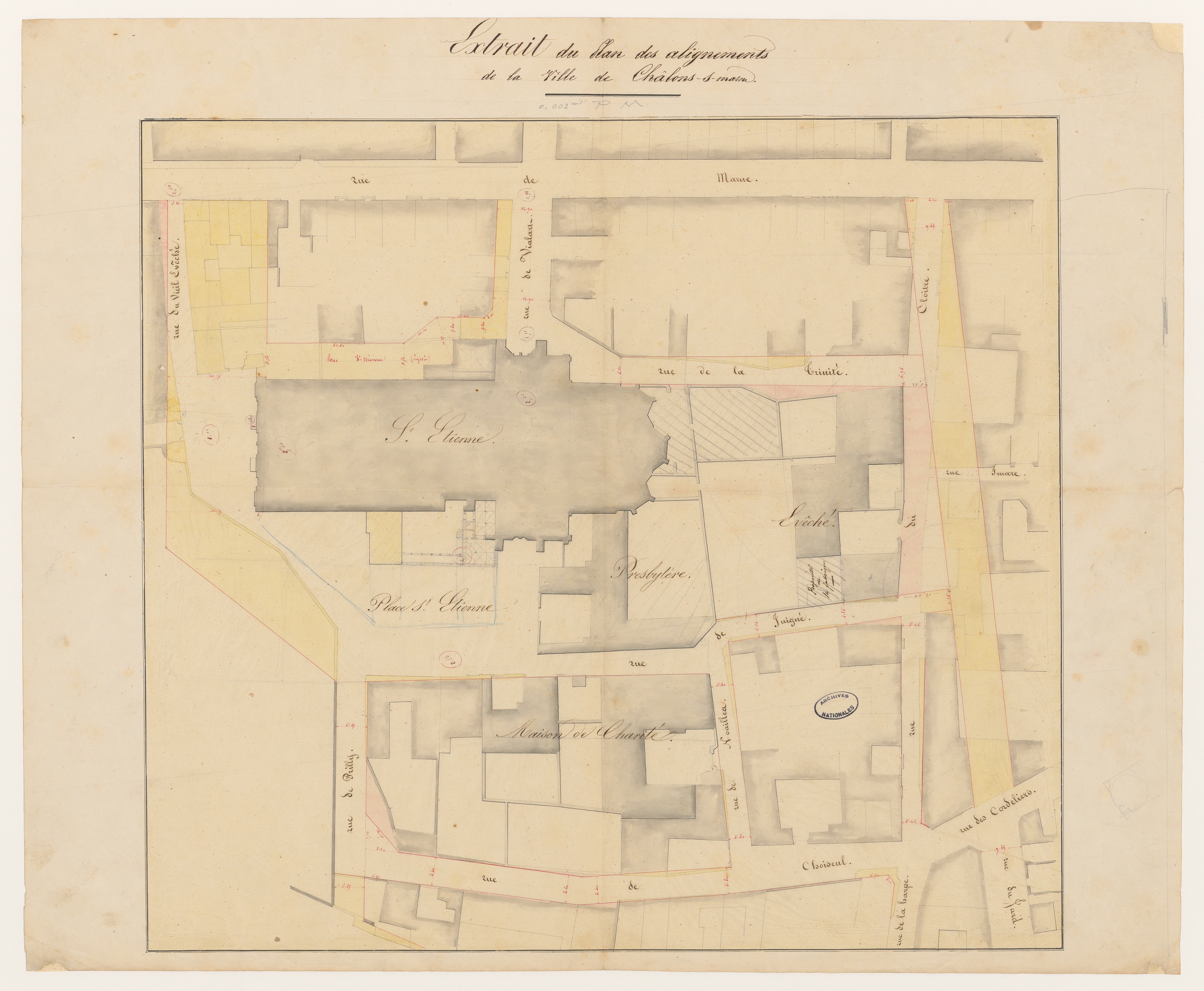 Extrait du plan des alignements de la ville de Châlons-s[ur]-Marne. Plan issu des dossiers de travaux de restauration des cathédrales (1802-1912), conservés aux Archives nationales (inventaire et autres documents numérisés consultables en ligne).